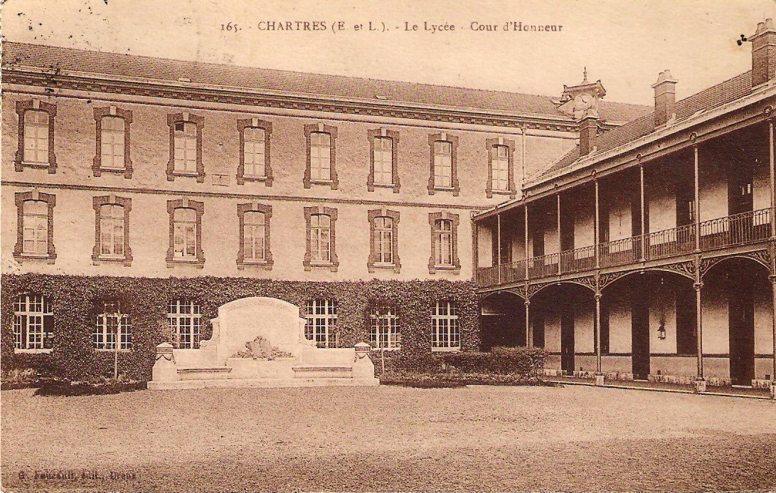 Cour d'Honneur du lycée Marceau, Chartres, Eure-et-Loir (France).